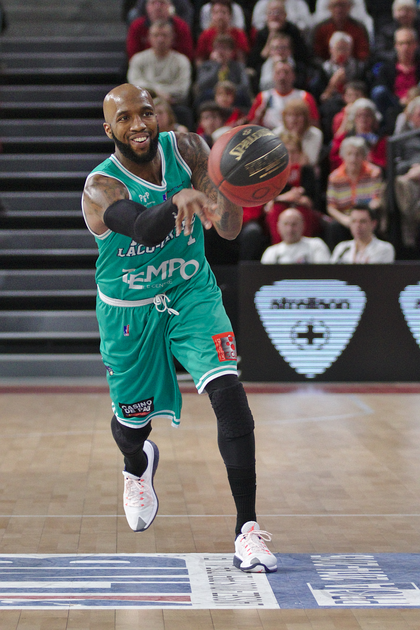 JLB-EB - 20150328 - Kevin Dillard